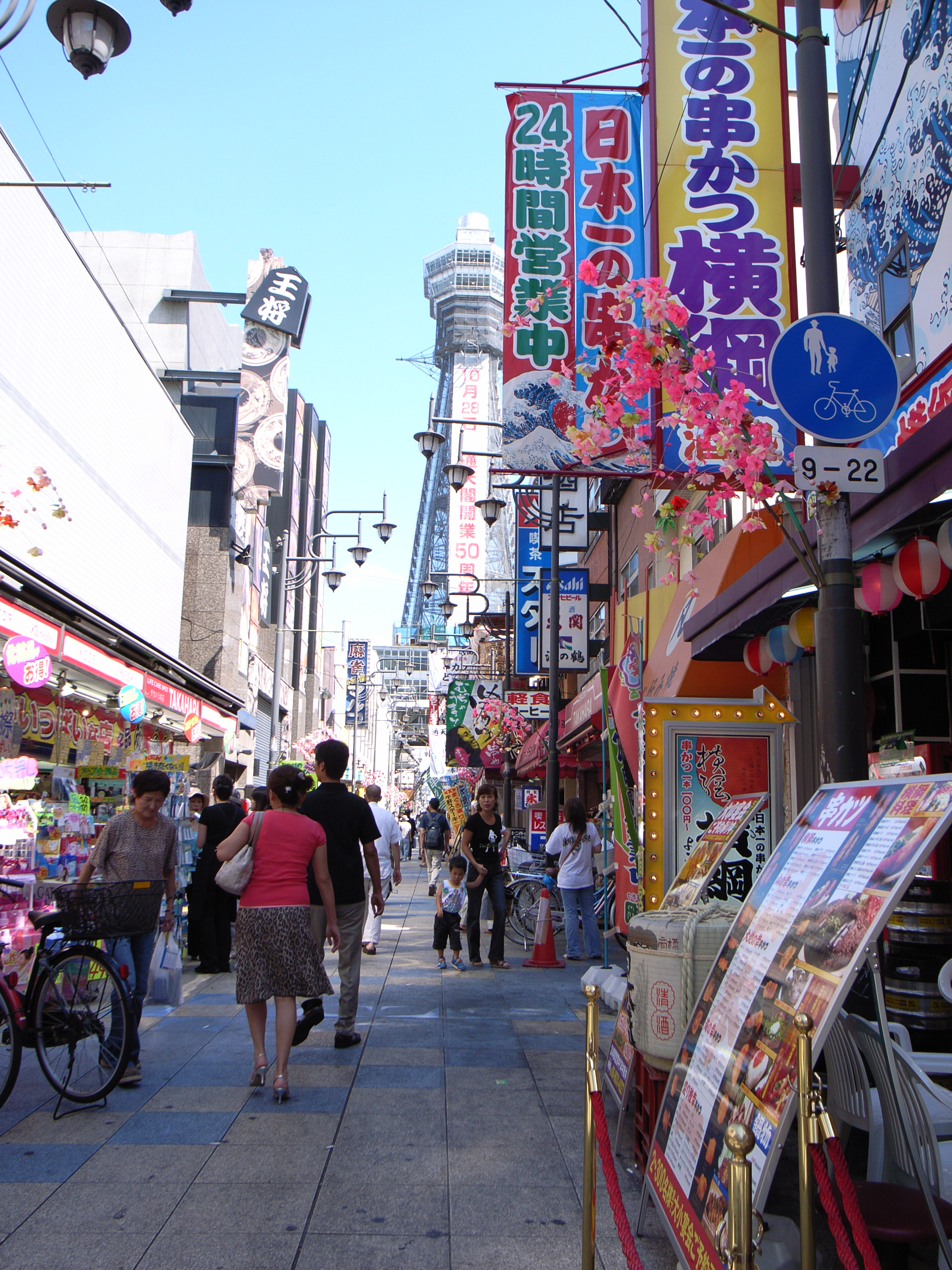 新世界（大阪市浪速区）